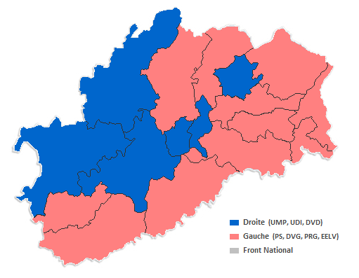 Résultats par canton des élections départementales de 2015 en Haute-Saône.